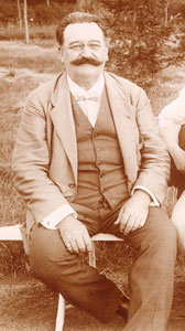 Rudolf Novacek (1860-1929)